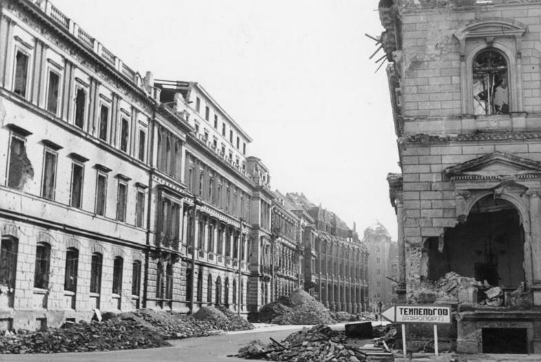 Berlin im Frühjahr 1946, Wilhelmstraße - Ecke Reichskanzlei, Fotograf: Erich O.Krueger 240-46